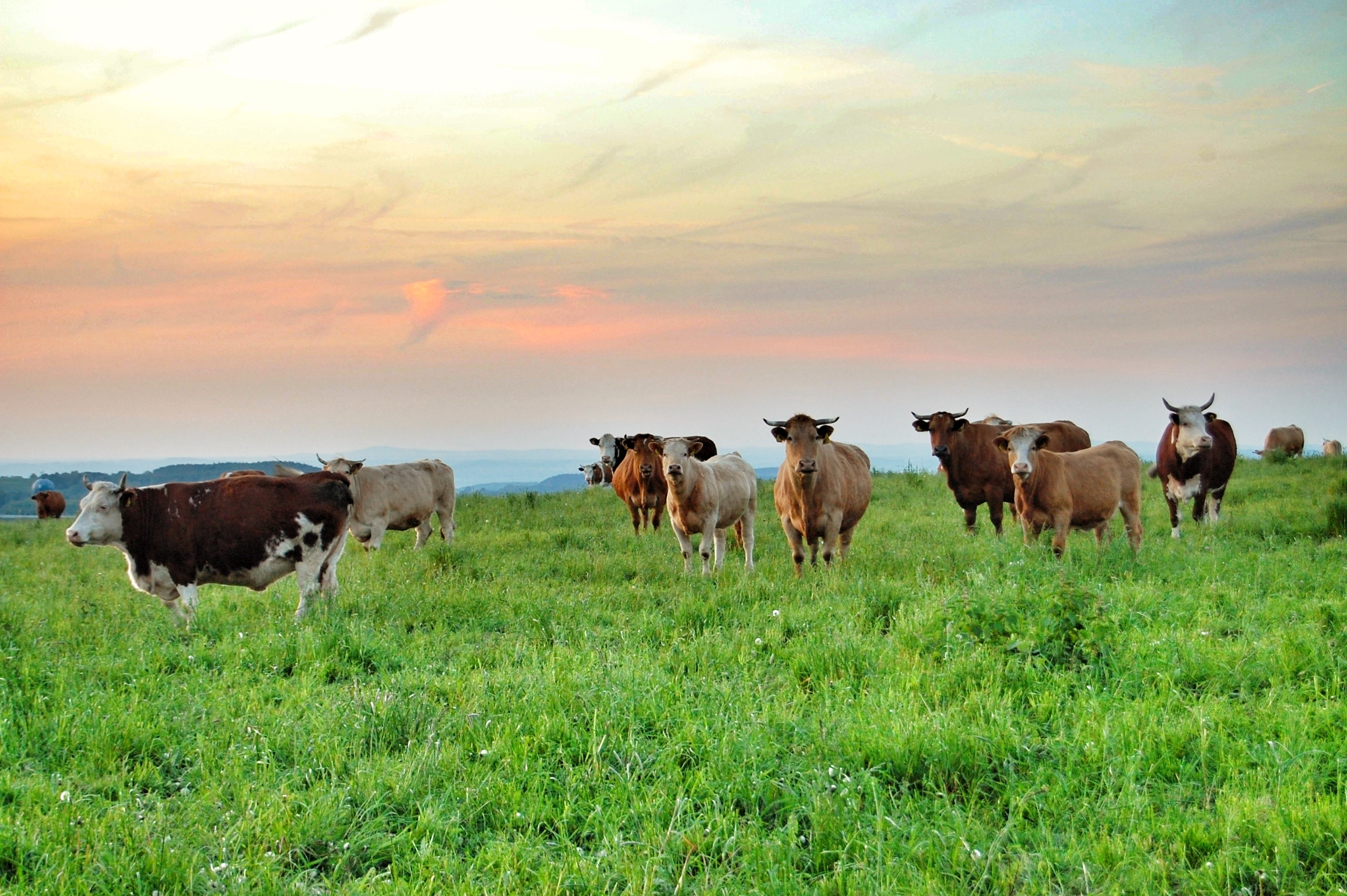 Pasoucí se tur domácí u Krásného Lesa v Krušných horách